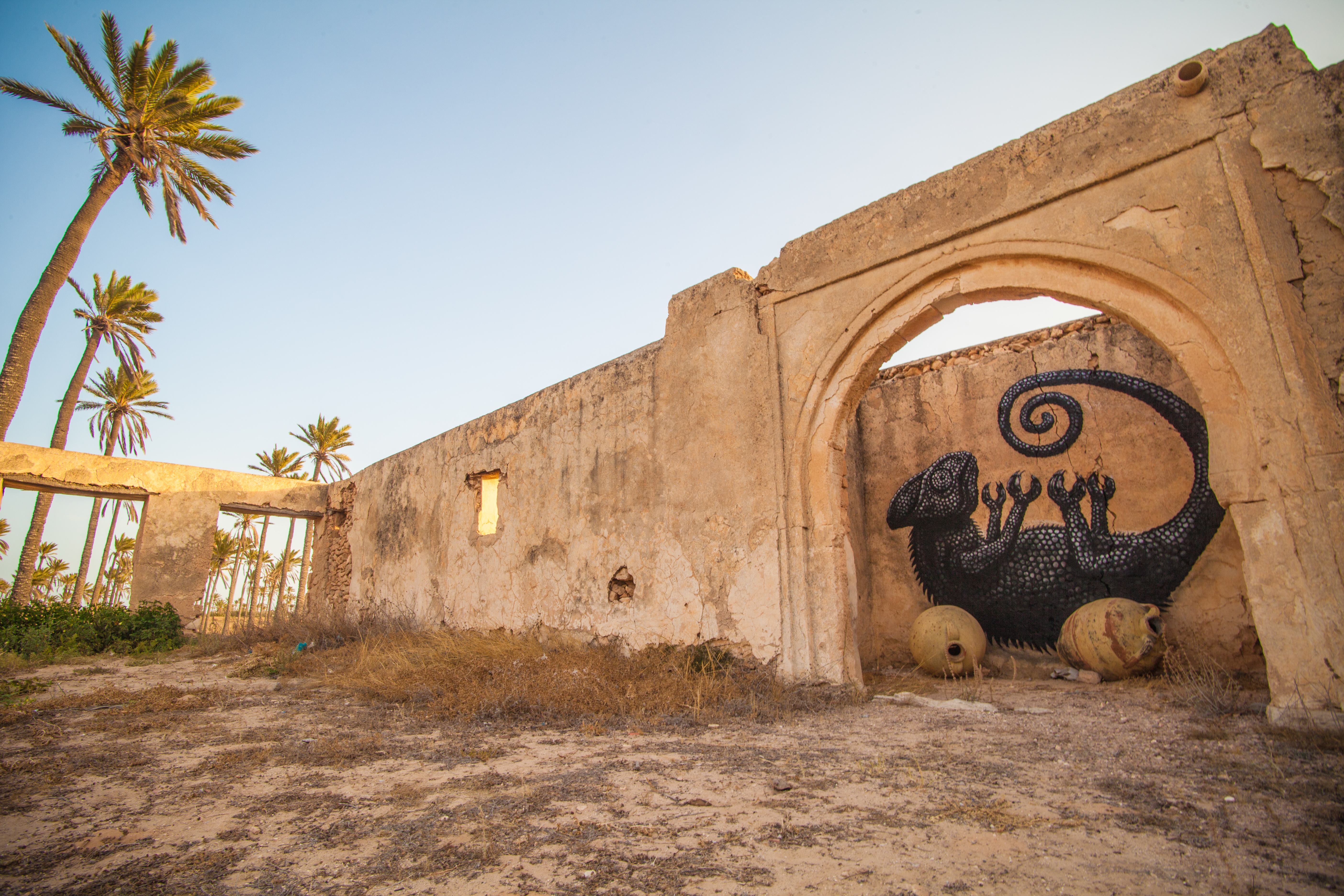 Une fresque de l'artiste belge ROA, à l'extérieur du village d'Erriadh, dans le cadre de Djerbahood